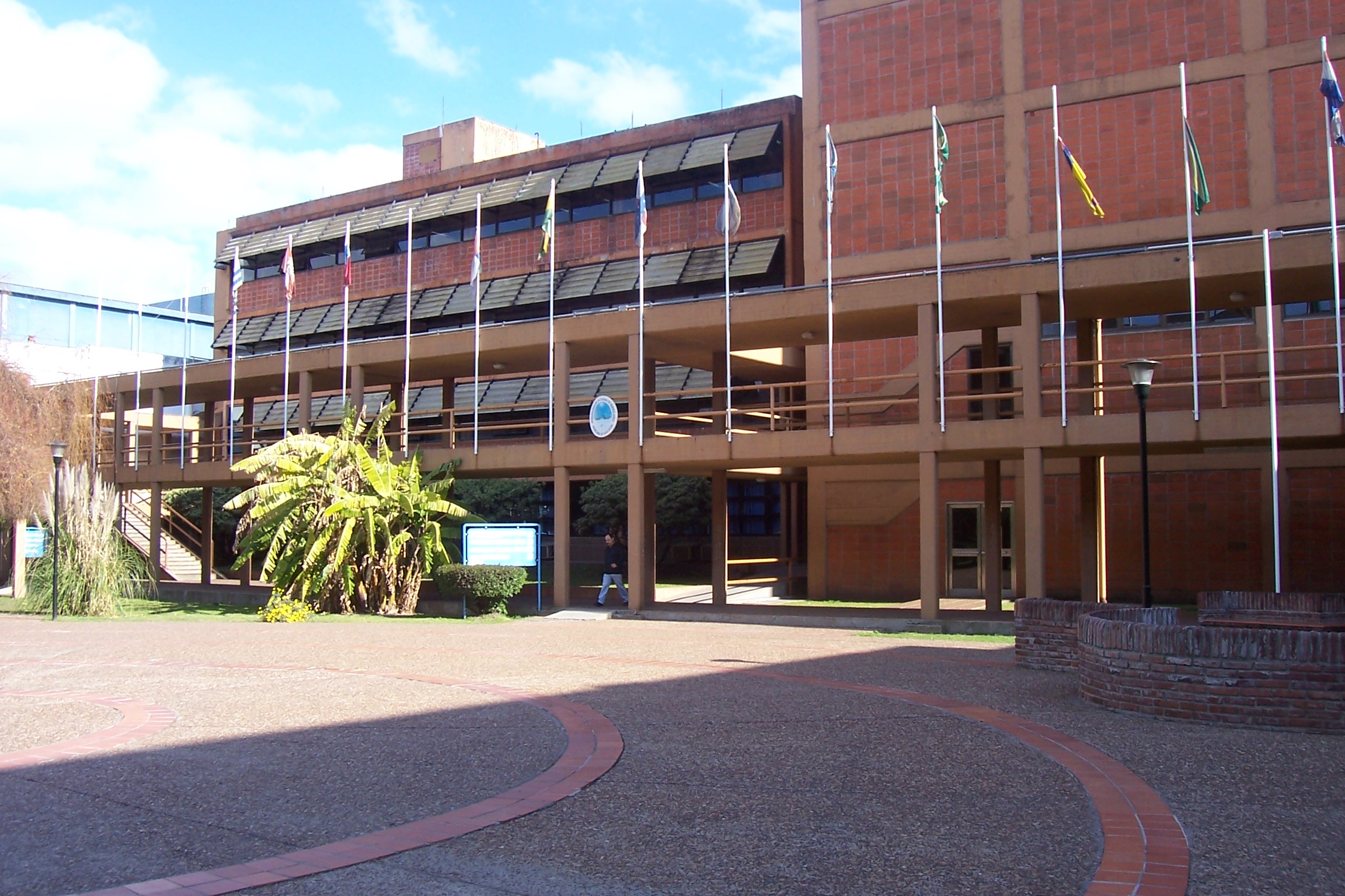 Centro Nacional de Alto Rendimiento Deportivo (CeNARD) donde se llevaron acabo los VIII Juegos Sudamericanos, en Argentina.